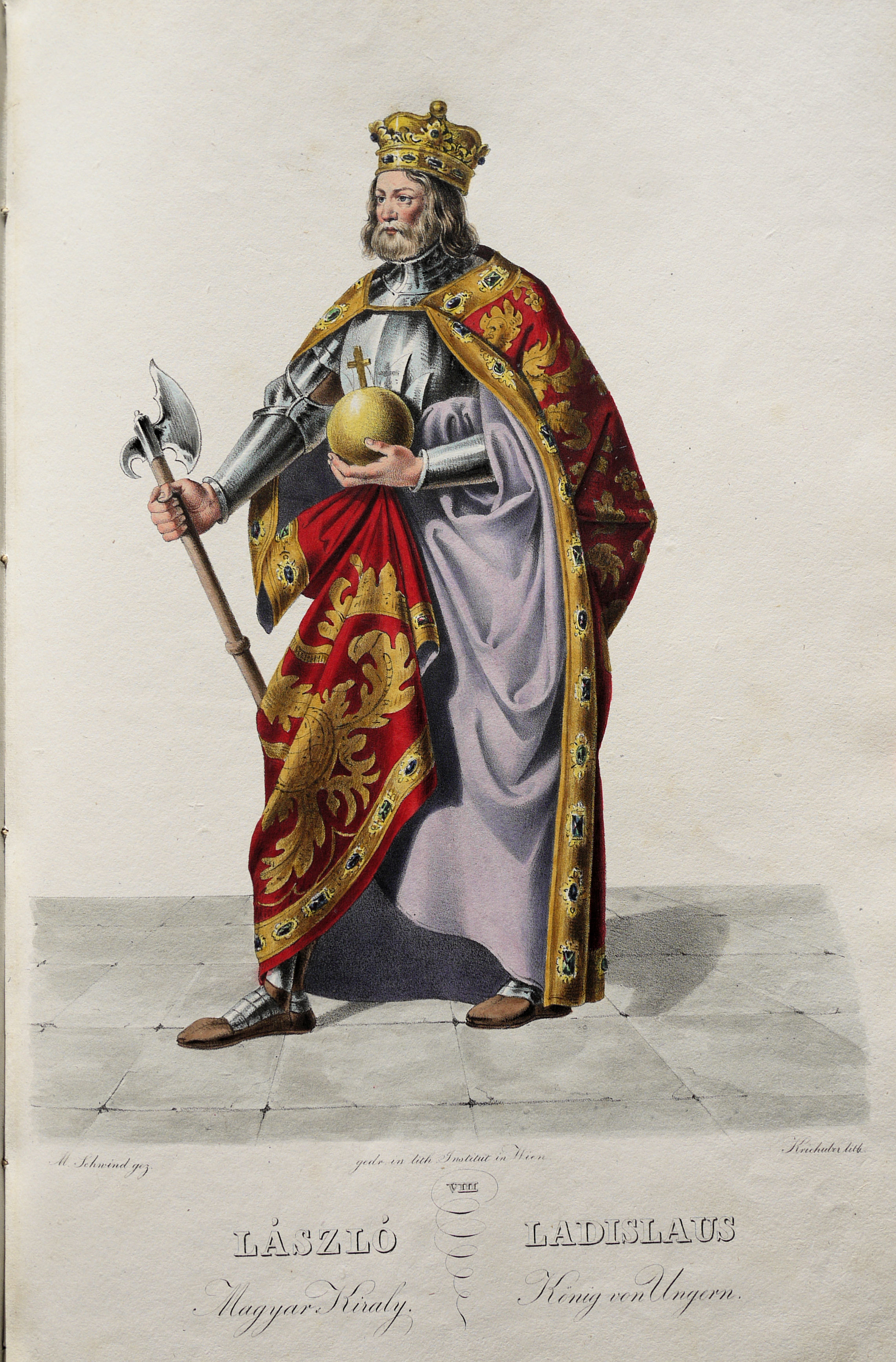 Ladislaus I. (1048-1077), König von Ungarn. Lithographie von Josef Kriehuber nach einer Zeichnung von Moritz von Schwind aus Ungerns Erste Heerführer Herzoge und Koenige In einer Reihe von Bildnissen von Bela bis auf Seine Majestät Franz I. Kaiser Von Österreich König Von Ungern &c., &c. Wien : Lithographisches Institut ;ca. 1828